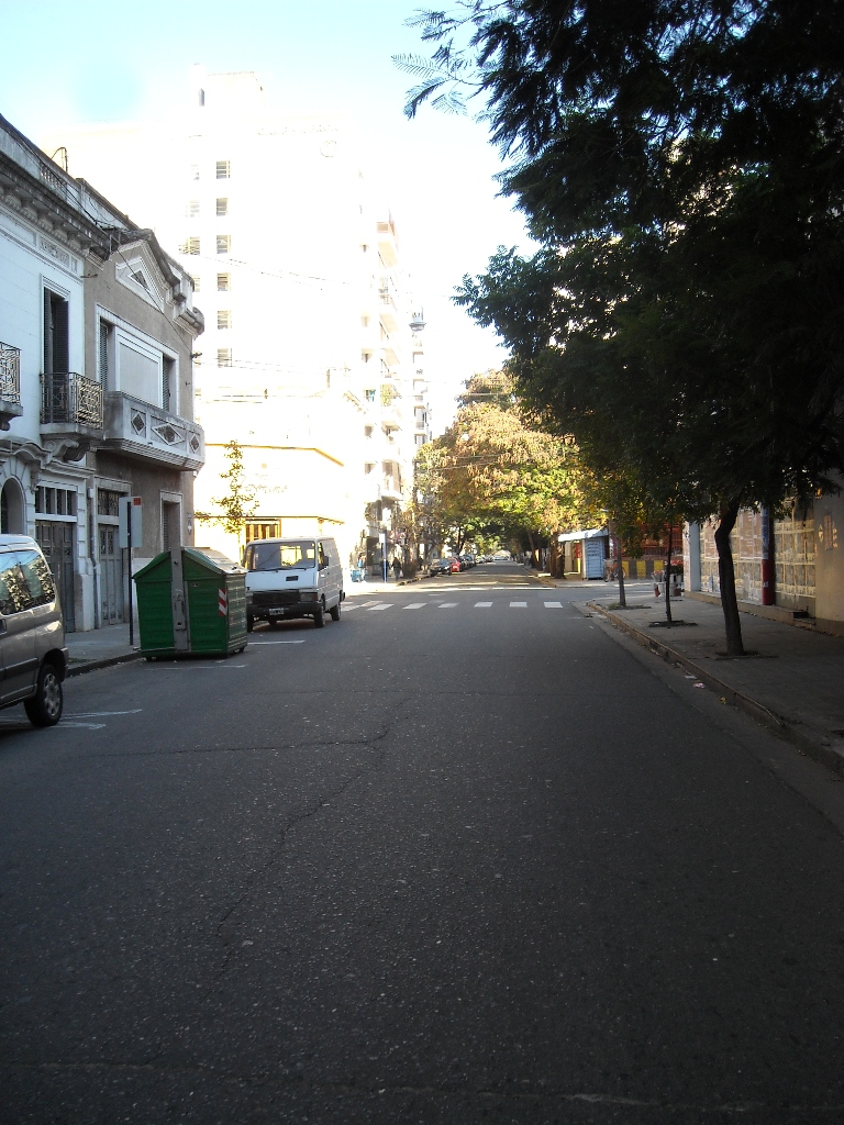 Calle Buenos Aires entre 3 de Febrero y 9 de Julio